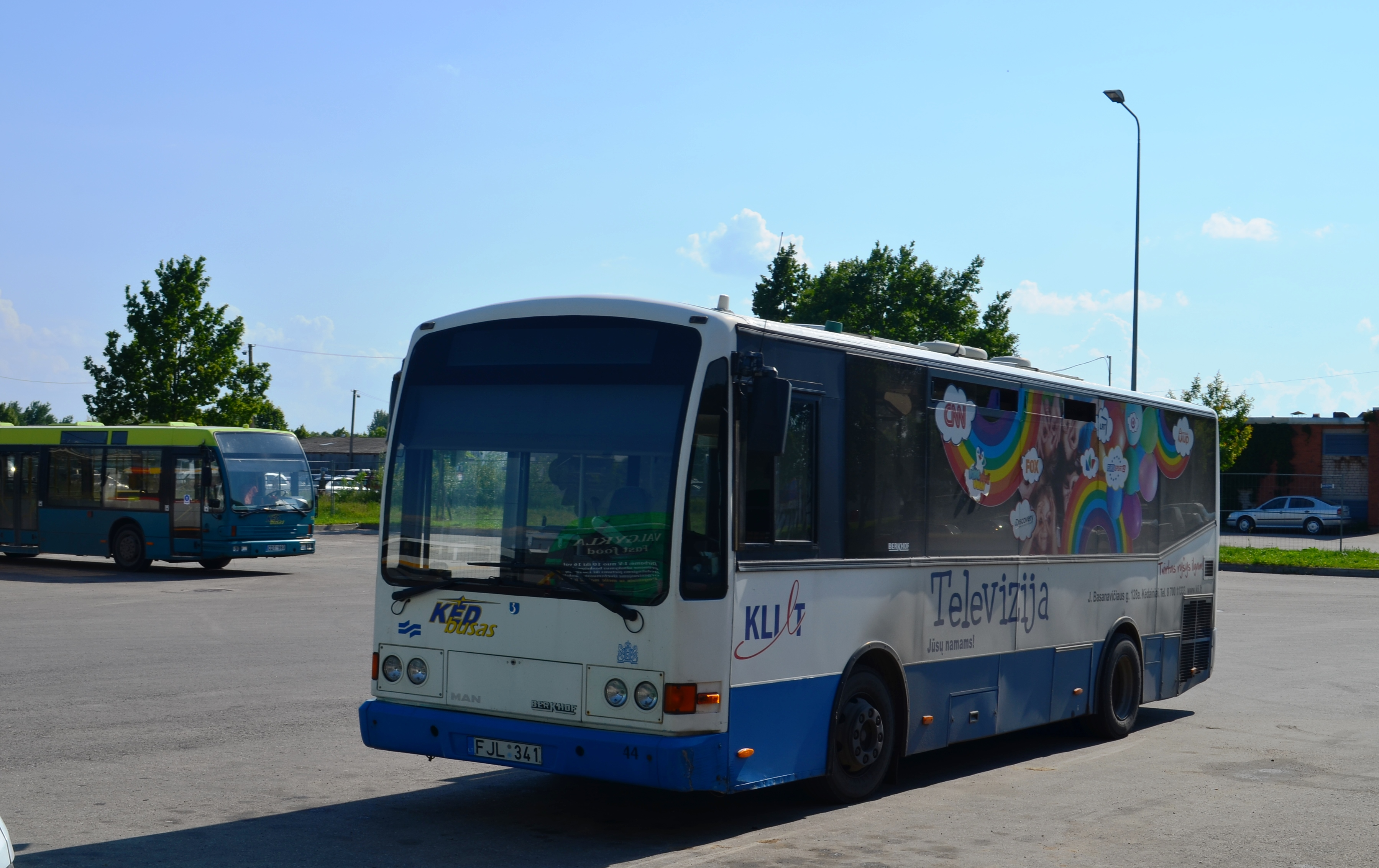 "Kėdbuso" autobusas MAN-Berkhof, Kėdainių autobusų stotis